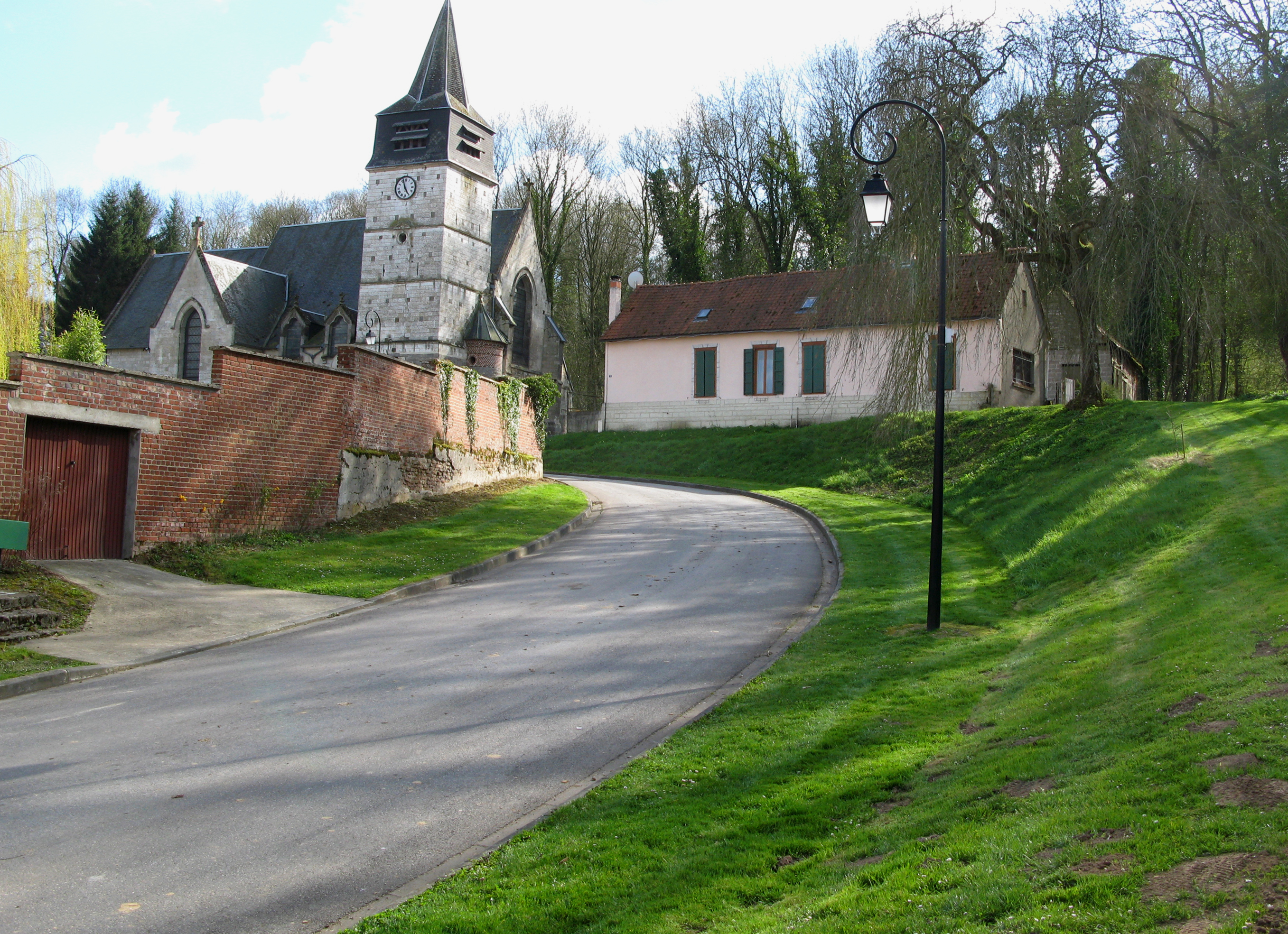 Toutencourt (Somme, France) - La rue menant à l'église et à la motte castrale.